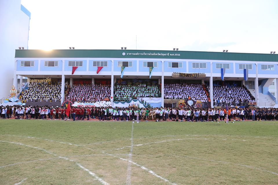 อาคารเอนกประสงค์องค์การบริหารส่วนจังหวัดปทุมธานี โรงเรียนสวนกุหลาบวิทยาลัย รังสิต